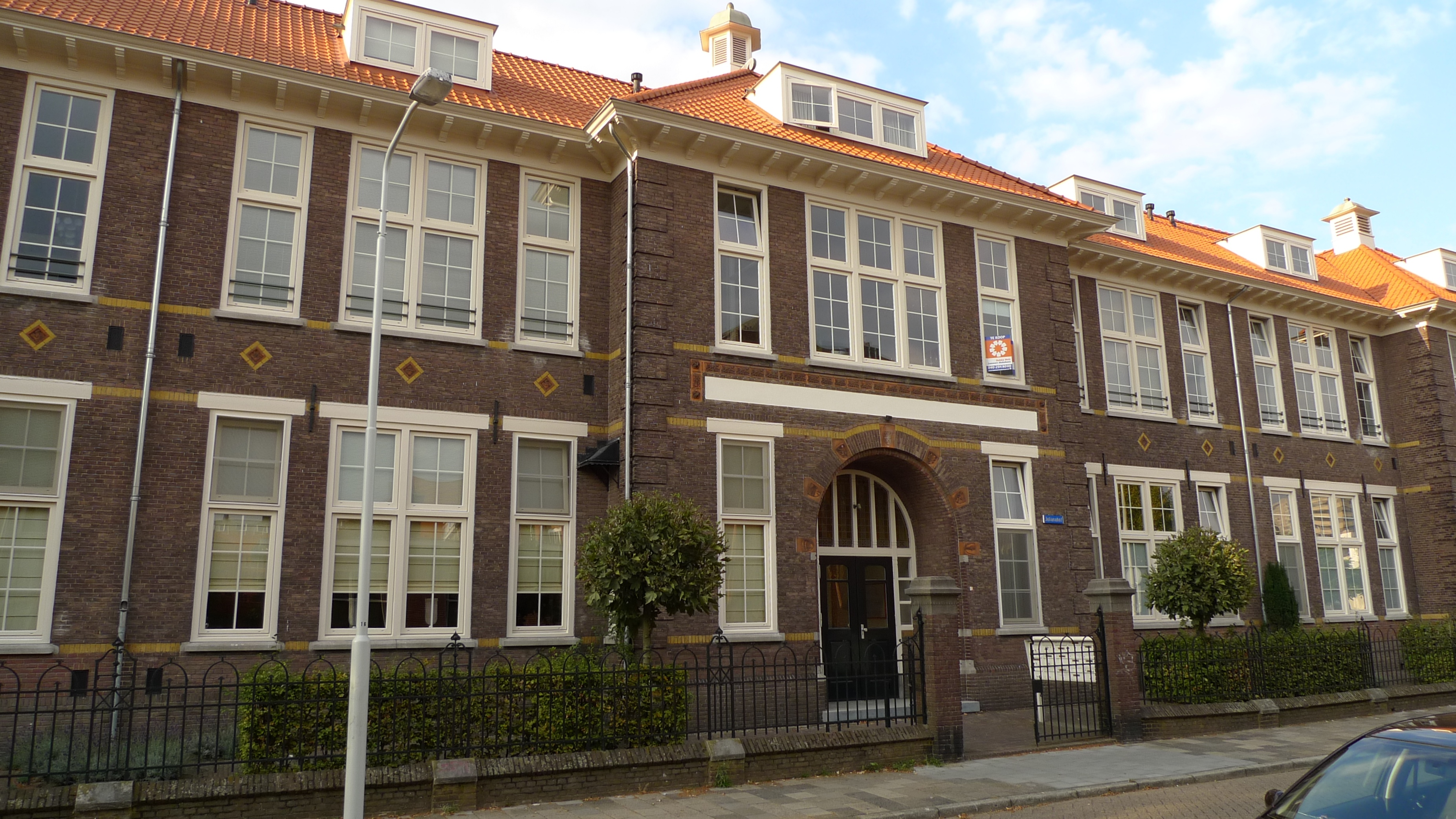 Voormalige gemeentelijke HBS op Julianahof 2 in Eindhoven. Nederlands rijksmonument nr. 518807